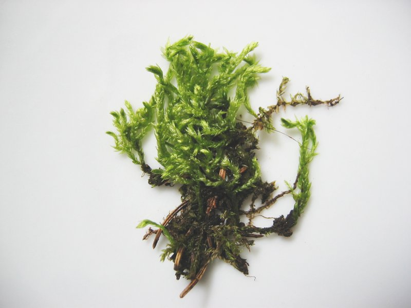 Mauer-Schnabeldeckenmoos (Rhynchostegium murale), Habitus